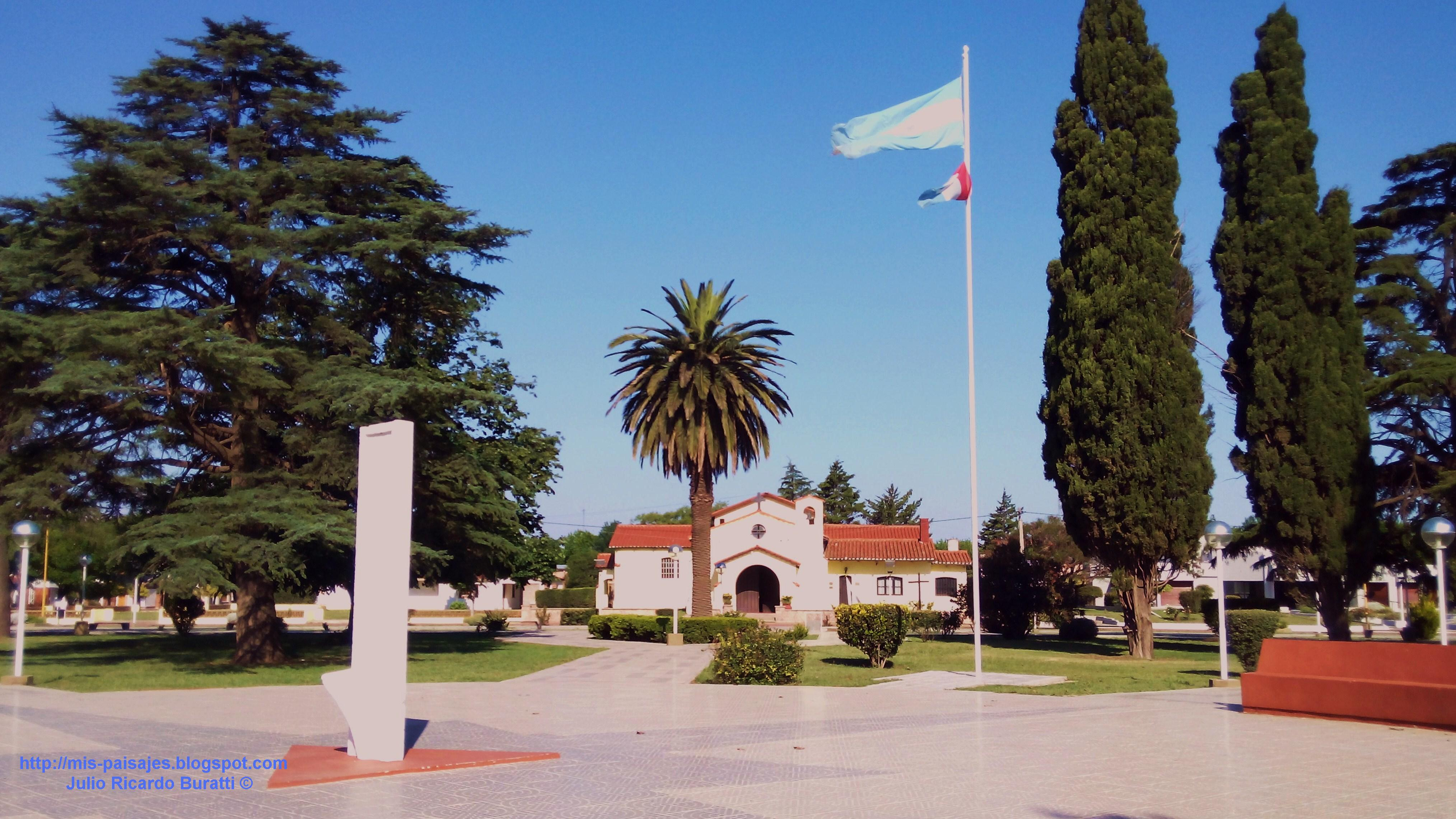 Plaza principal y Parroquia Santa Paula.